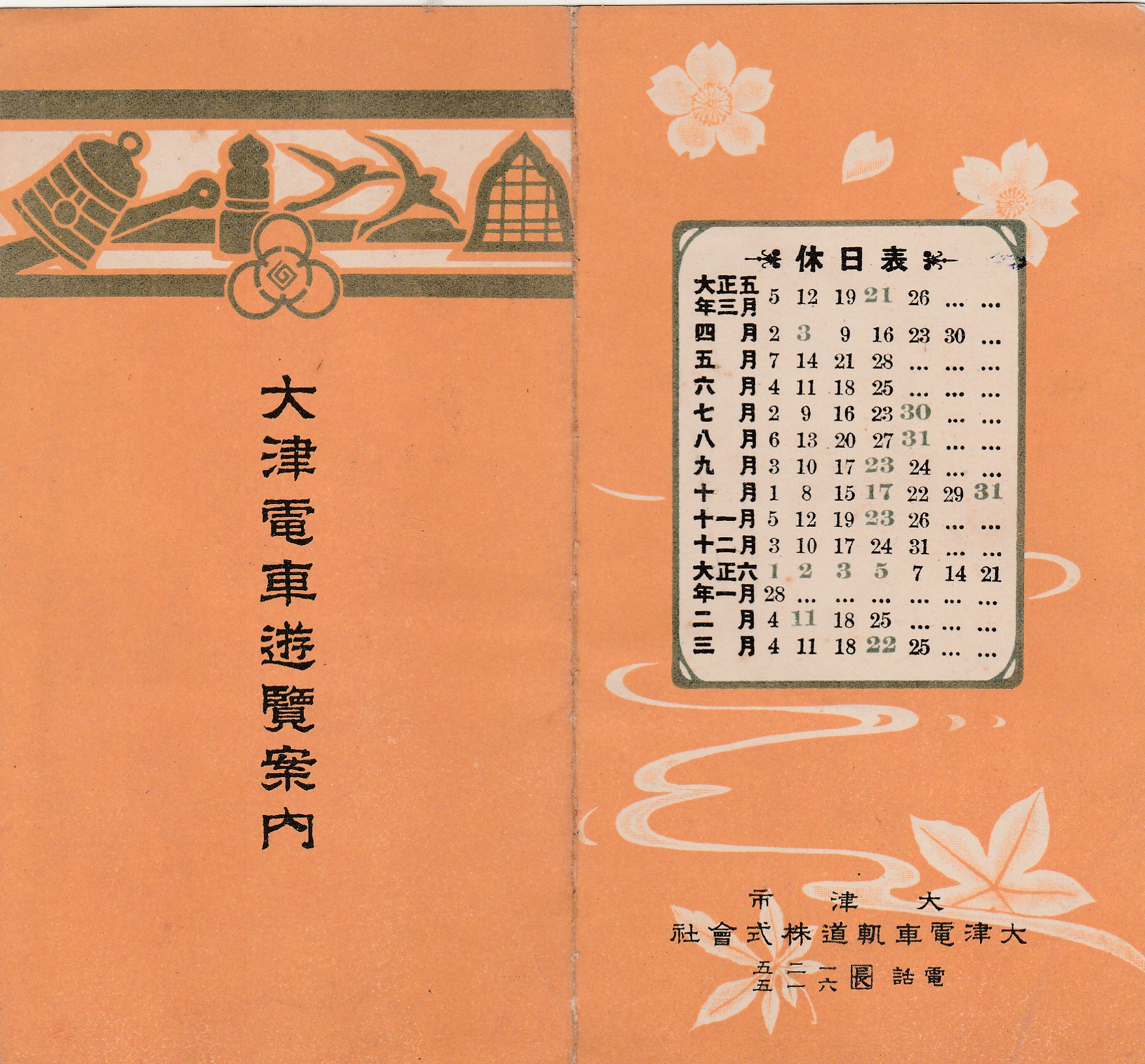 大津電車軌道が１９１６（大正５）年に発行した「大津電車遊覧案内」の表側。